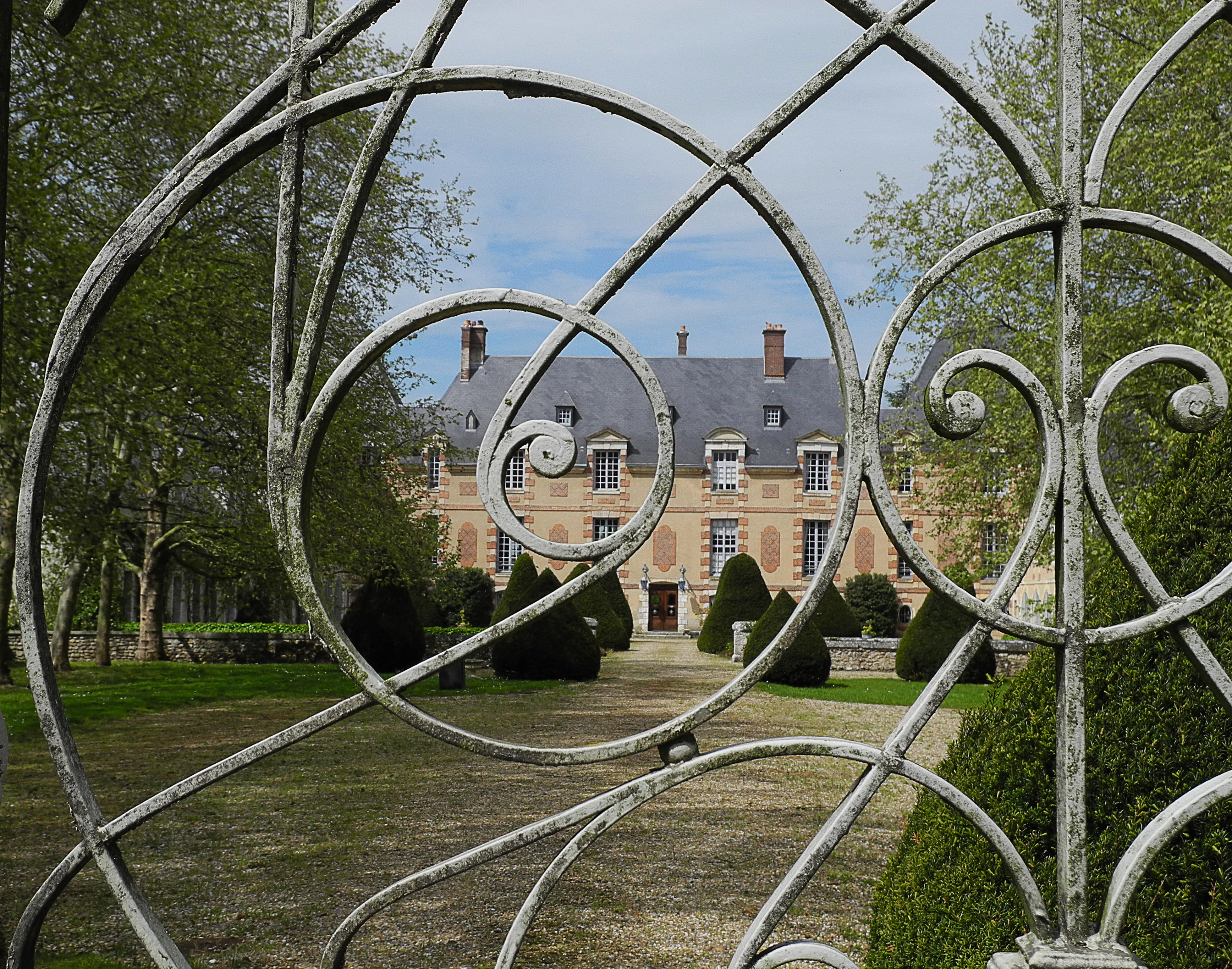 Le château de Brécourt, à Douains (Eure)